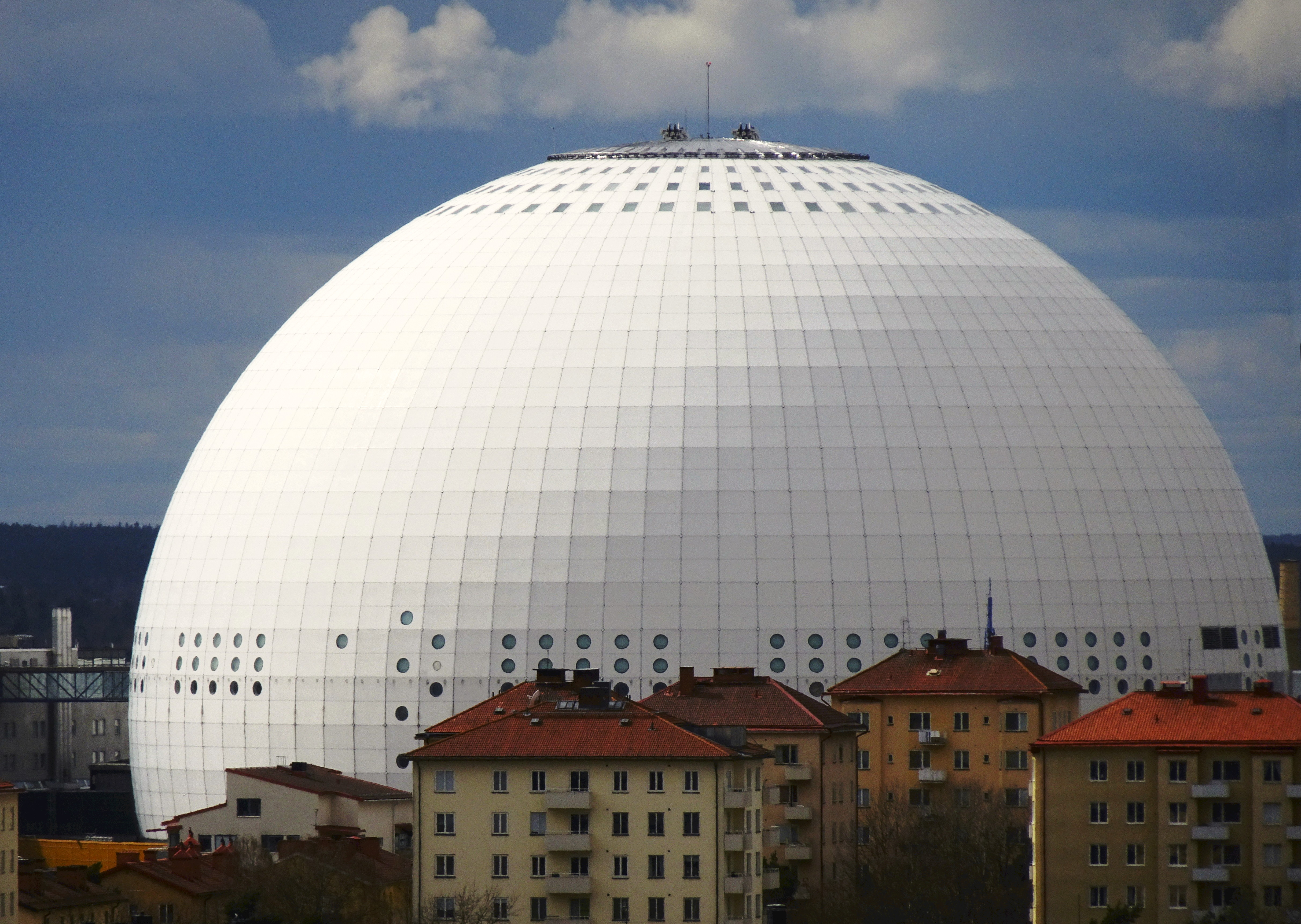 Globen från Hammarbybacken/toppen